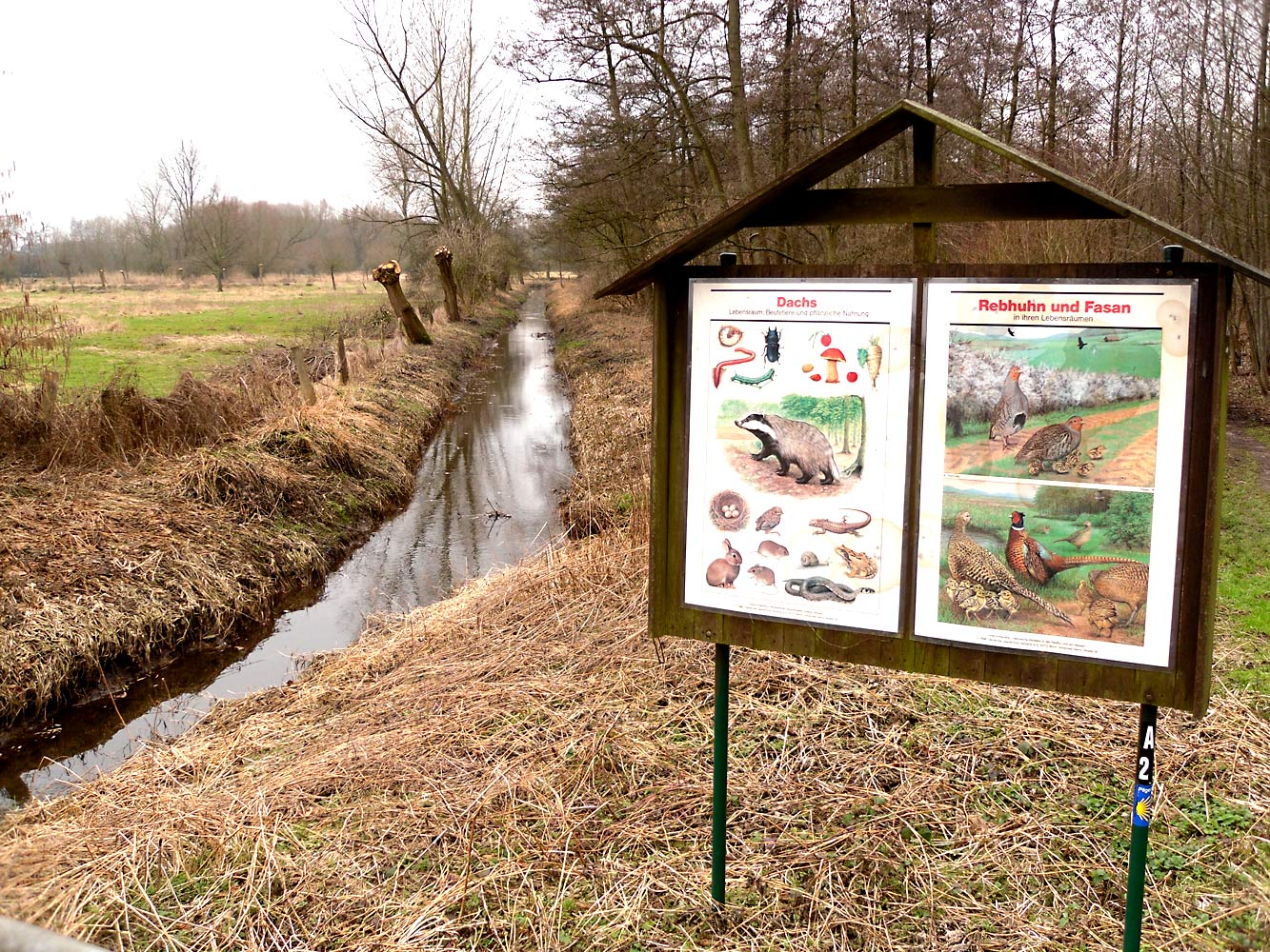 Ilvericher Altrheinschlinge